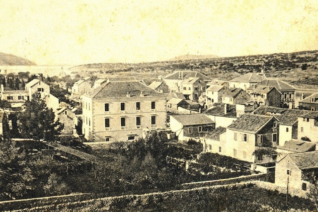 Stari Grad, Palác Biankini, pohled od dominikánského kláštera.